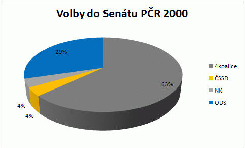 Výsledky voleb do Senátu PČR v roce 2000